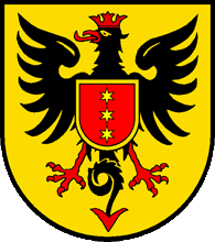 Gemeindewappen von Brig-Glis VS Schweiz